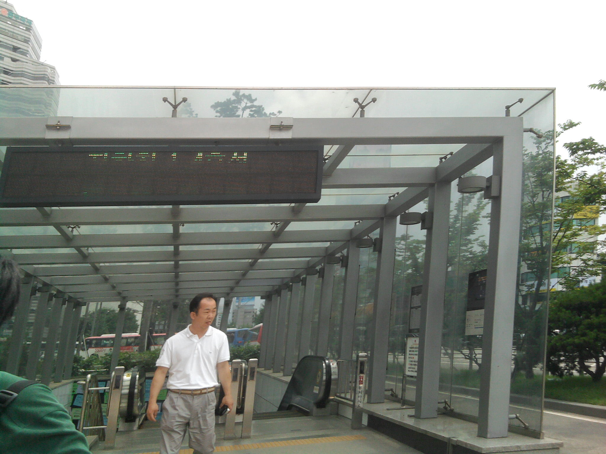 ソウル駅バス乗換センター方面9-1番出口